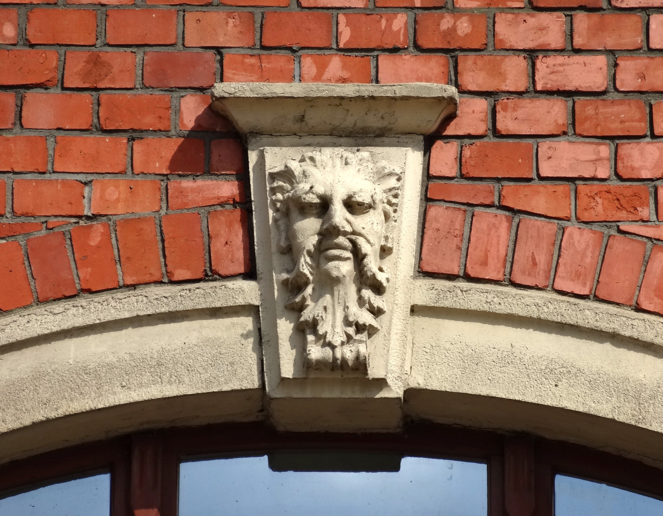 Pałacyk Lloyda w Bydgoszczy (zbud. 1886), dawna siedziba przedsiębiorstw żeglugowych, położony w strefie staromiejskiej nad Brdą.